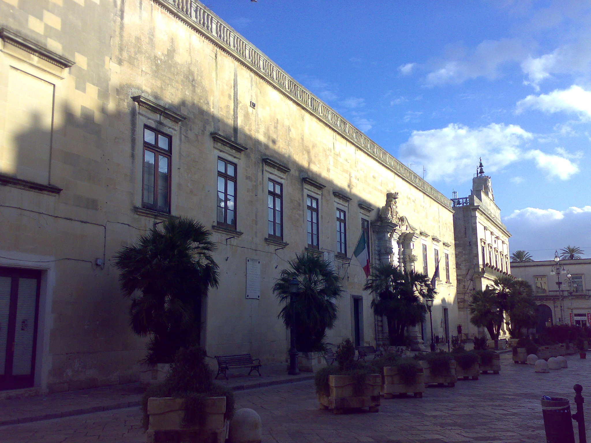 Palazzo Capece Maglie, provincia di Lecce